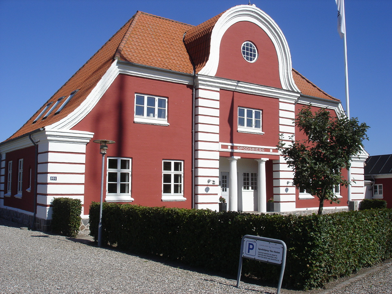 Spodsbjerg Station fra vejside